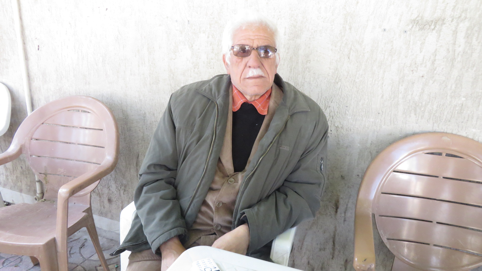 Mohamed Merdaci , écrivain en langue chaoui, historien et professeur